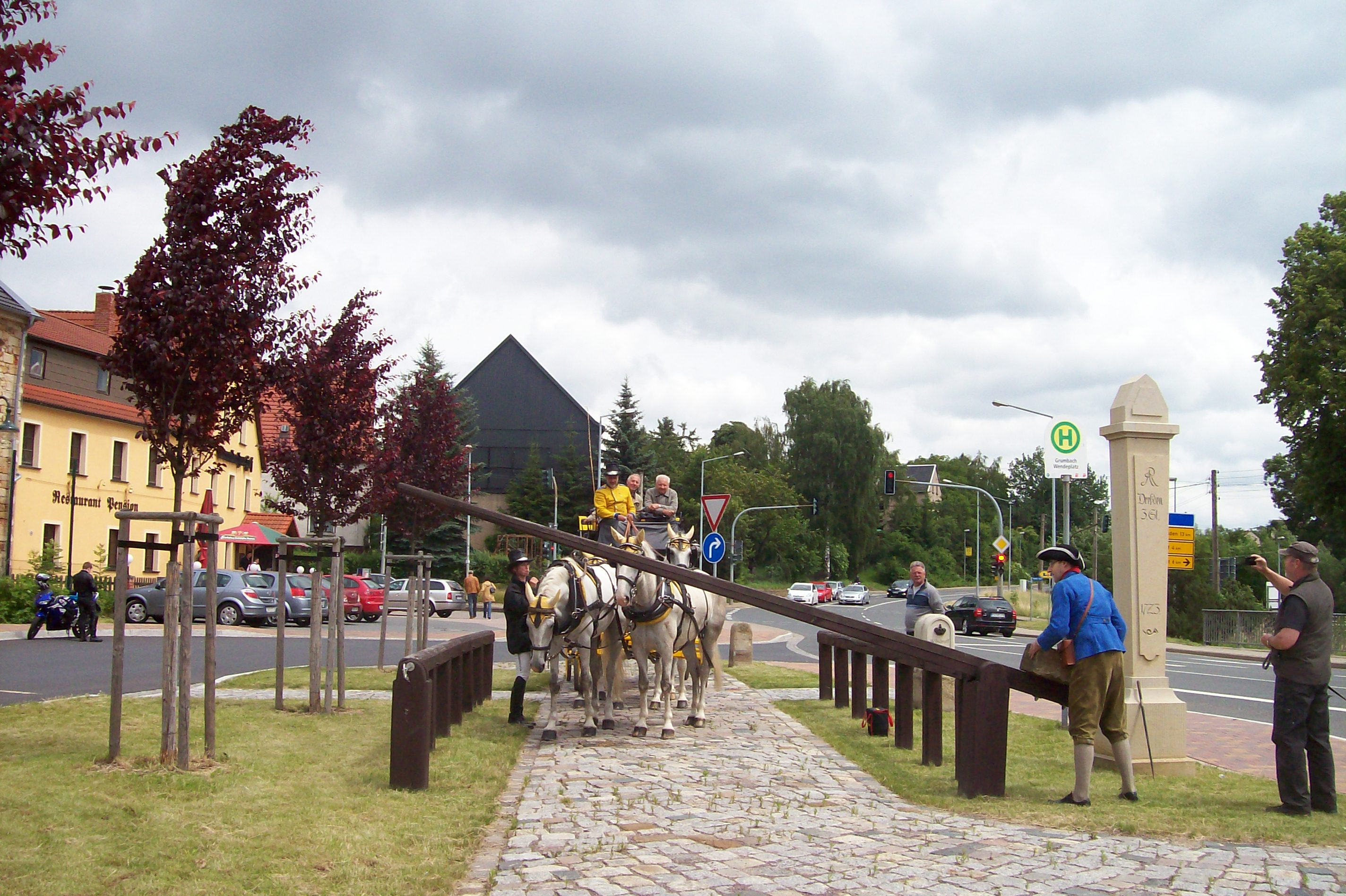 Postkutsche an der Geleitschranke in Grumbach bei Wilsdruff